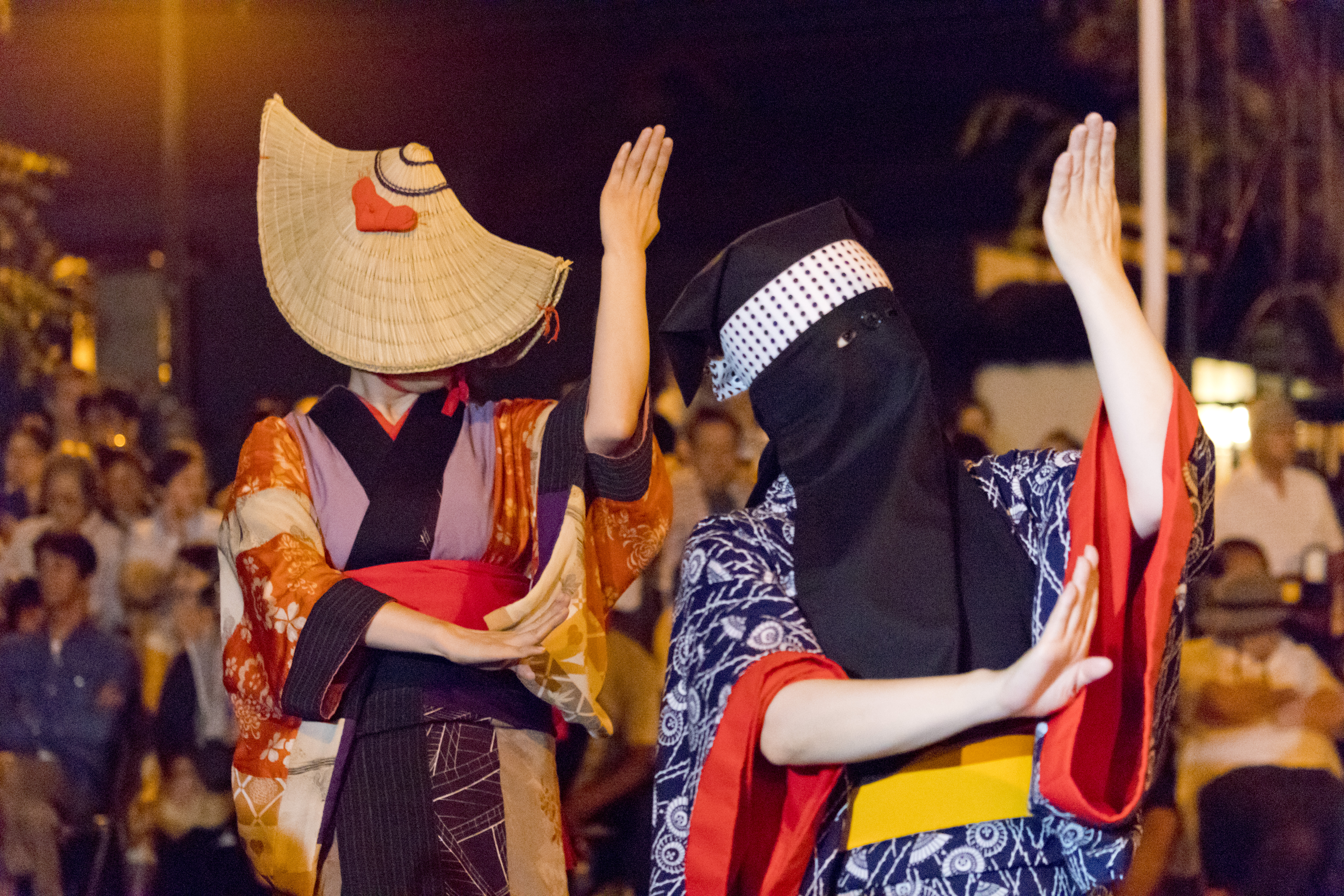 2018年秋田県雄勝郡羽後町西馬音内にて撮影。西馬音内盆踊りを代表する二種類の装束。藍染め浴衣に彦三頭巾を被った踊り手(右)と、端縫い衣装に編み笠を被った踊り手(左)。